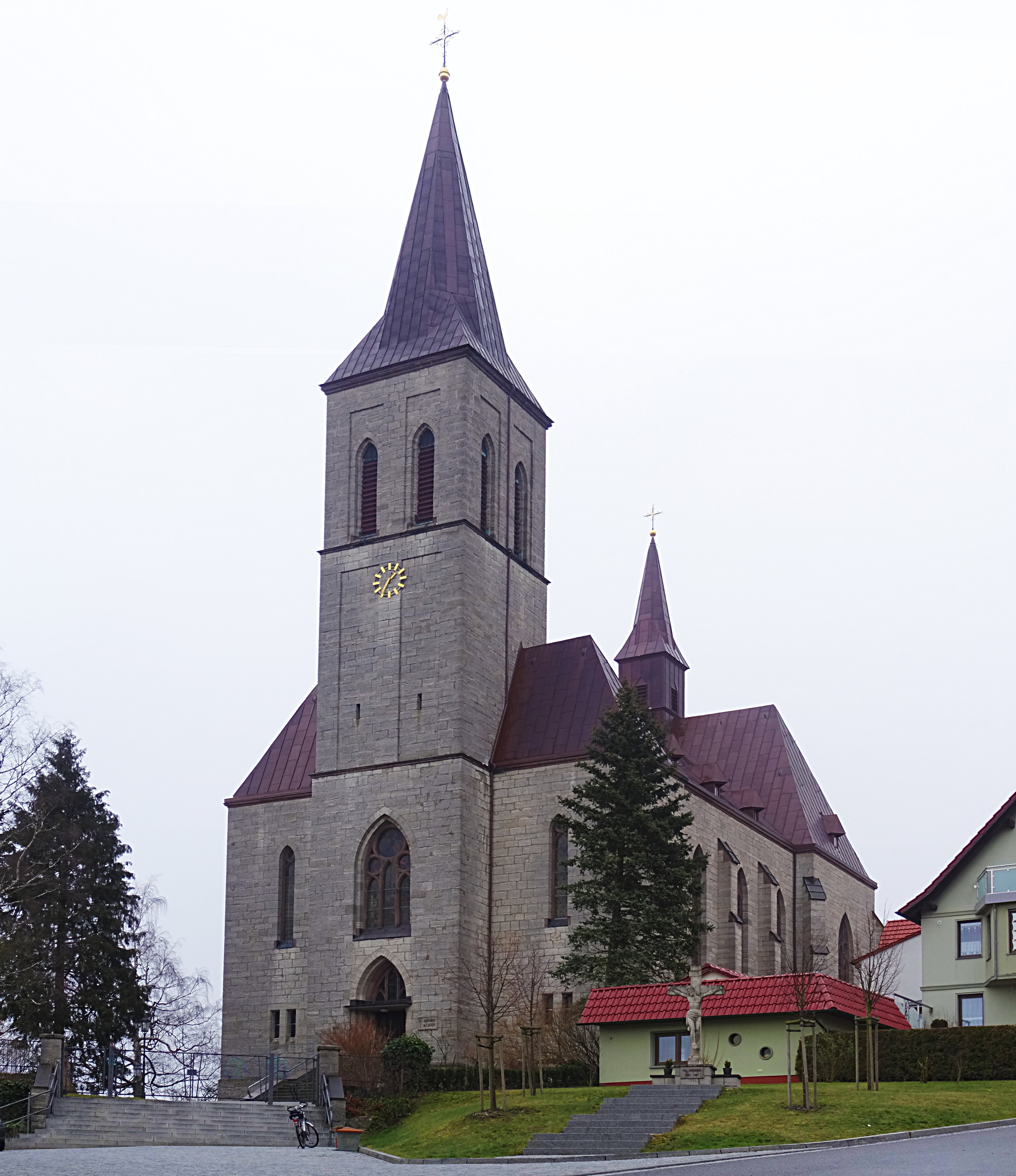 Der „Dom des Eichsfeldes“ St. Alban in Effelder